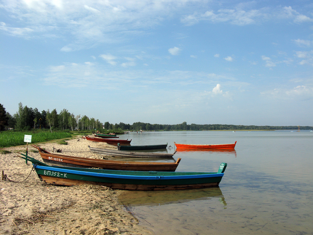 Шацький національний природний парк. Озеро Світязь.